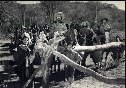 Foto de La Guerra Gaucha (1942), de Lucas Demare. En la foto Francisco Petrone.